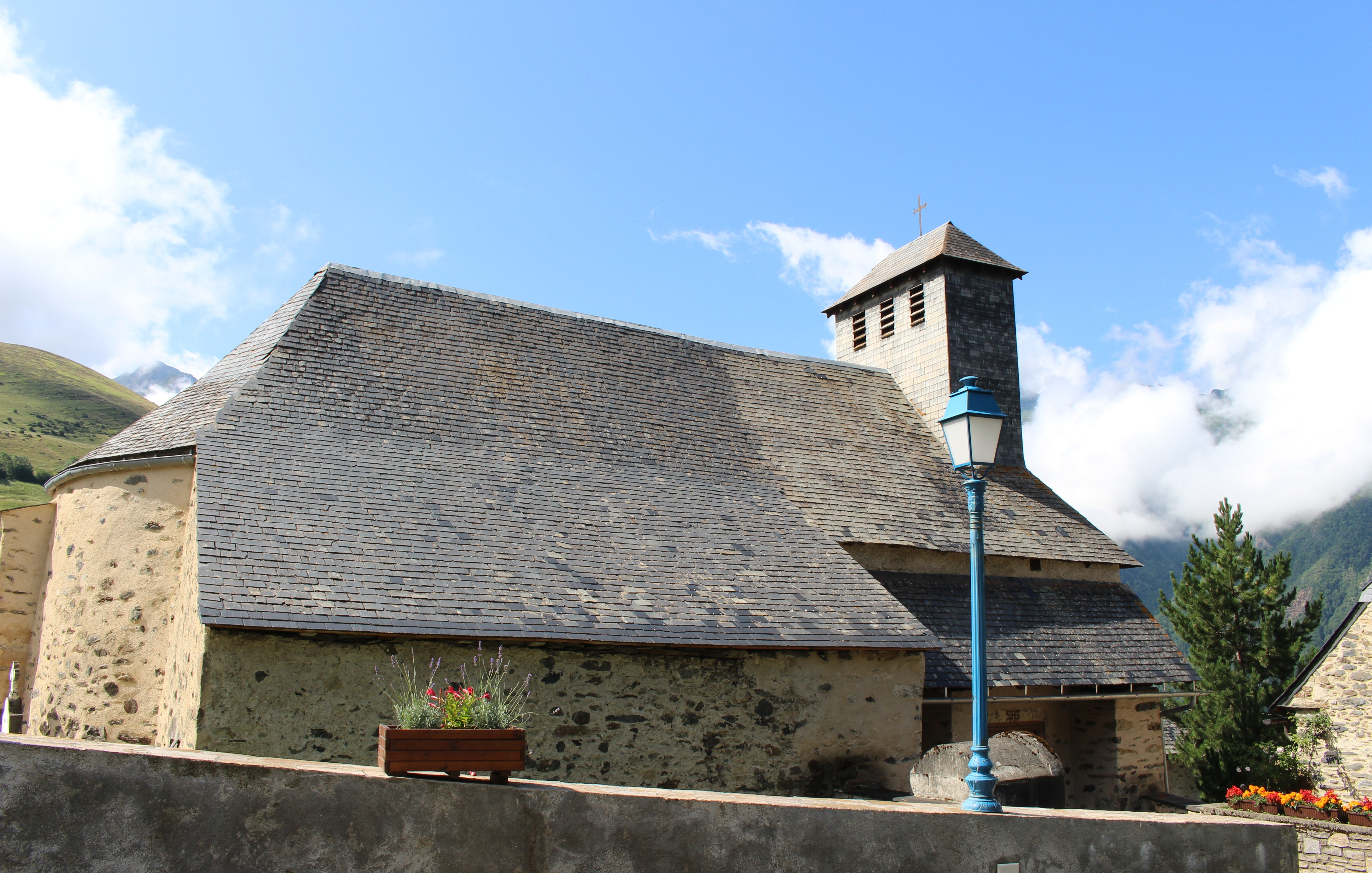 Église l'Invention-de-Saint-Etienne de Germ (Hautes-Pyrénées)